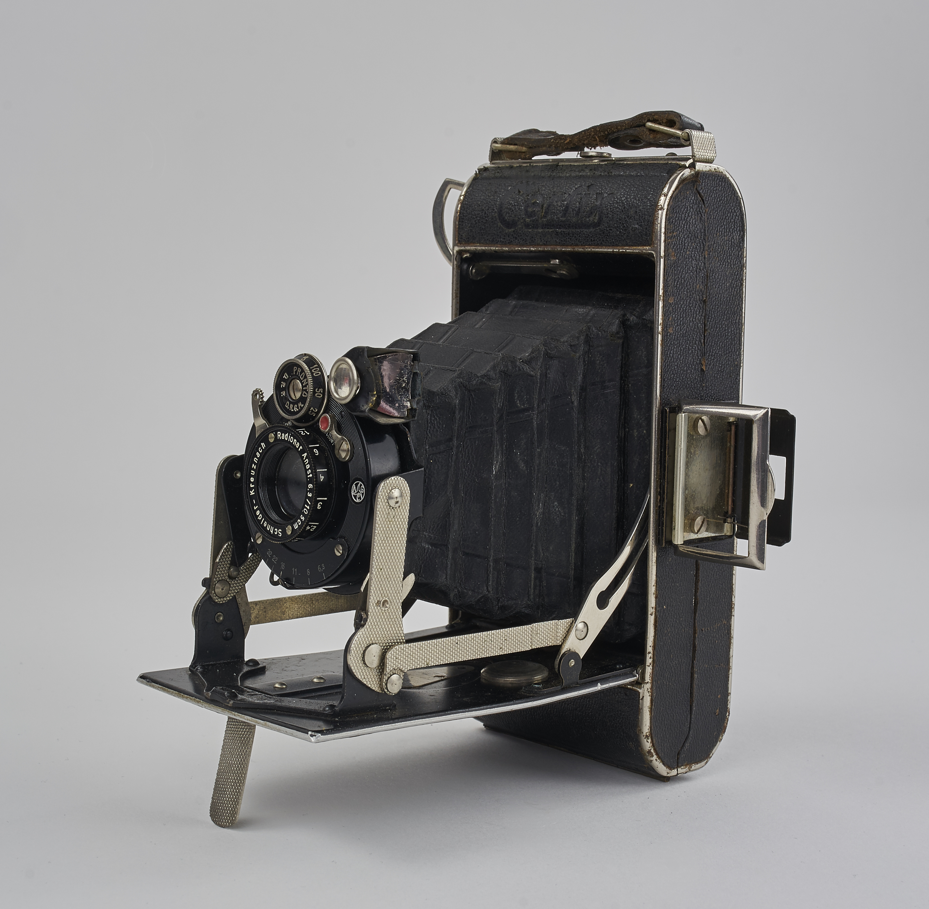 Certix Mittelformat Klappkamera